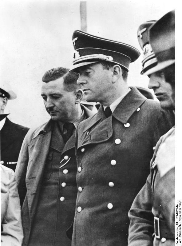 Scherl: Reichsminister Speer an der Atlantikküste, Reichsminister Speer in Begleitung des Leiters der OT-Zentrale, Ministerialdirektor [Xaver] Dorsch (links), besichtigt eine der gewaltigen Baustellen an der Atlantikküste, um sich von dem planmäßigen Fortgang der Arbeiten zu überzeugen. 6444-42 Zentralbild: II. Weltkrieg 1939 - 45 Der Reichsminister für Rüstung und Kriegsproduktion besichtigt in Begleitung des Leiters der OT-Zentrale (Organisation Todt), Ministerialdirektor Dorsch (links) eine Großbaustelle an der Atlantikküste. November 1942 B 22 744